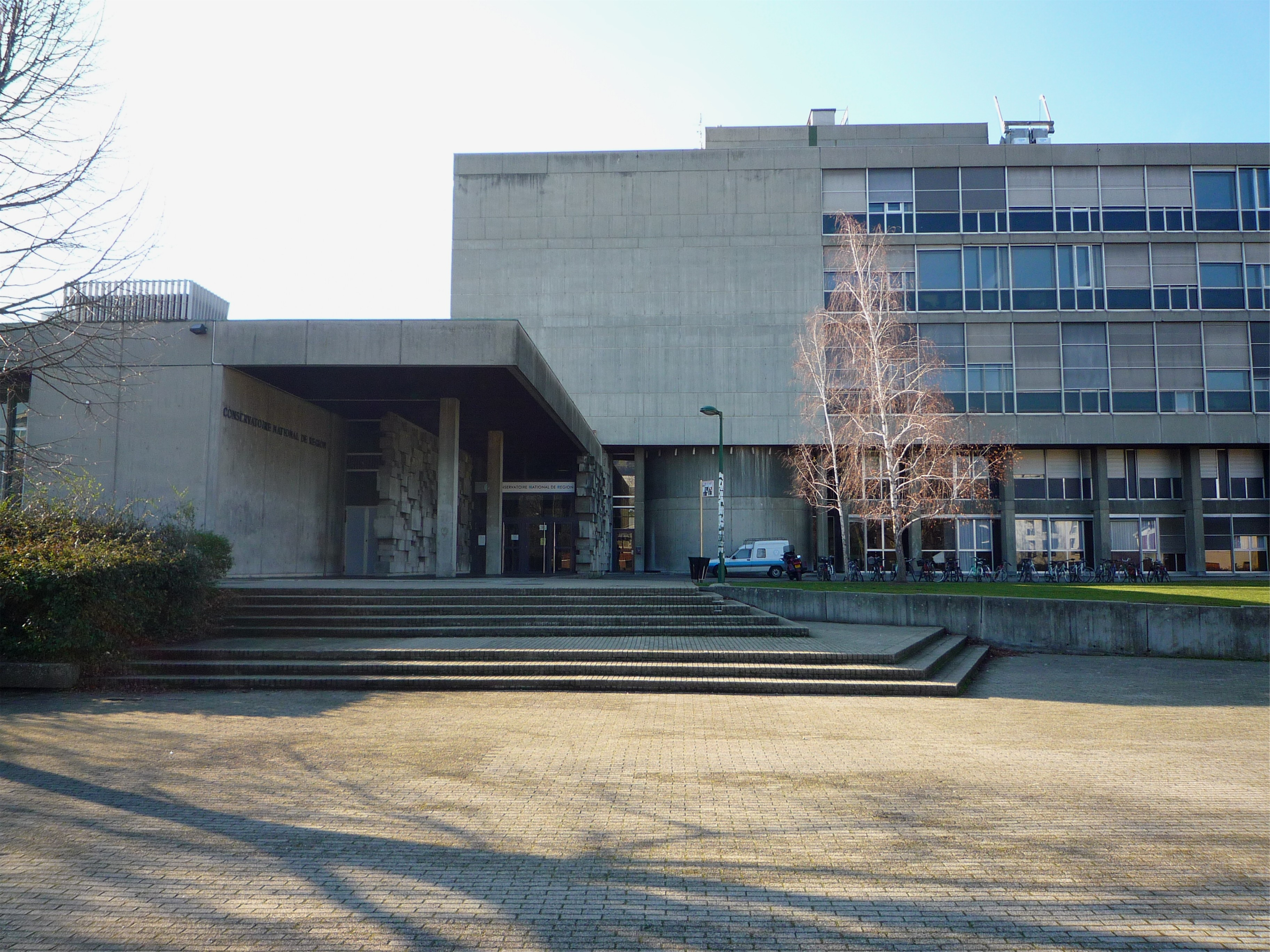 Conservatoire à rayonnement régional de Grenoble. (musique,danse, théâtre)